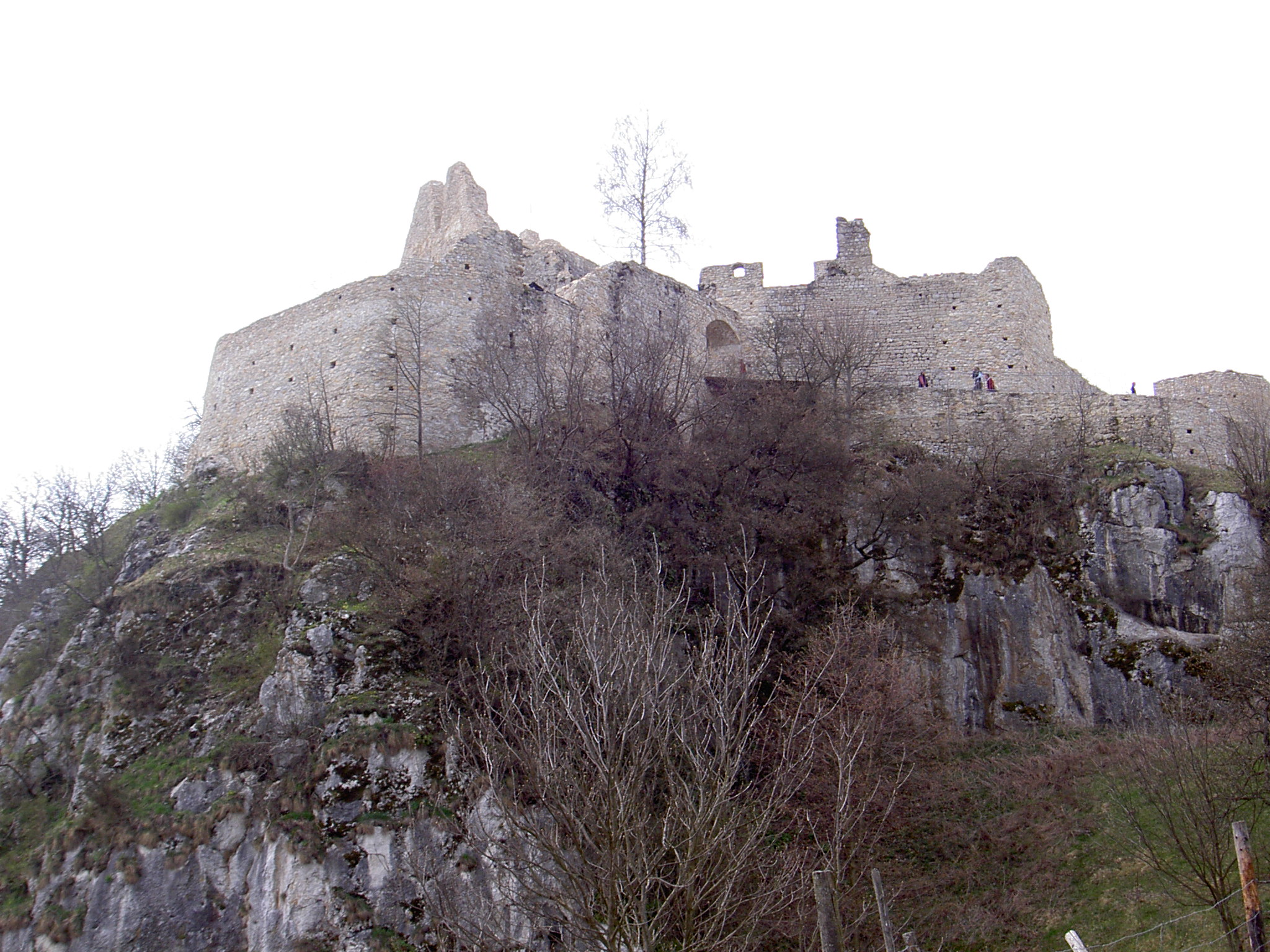 Burgruine Rabenstein in St. Paul, Kärnten, Österreich